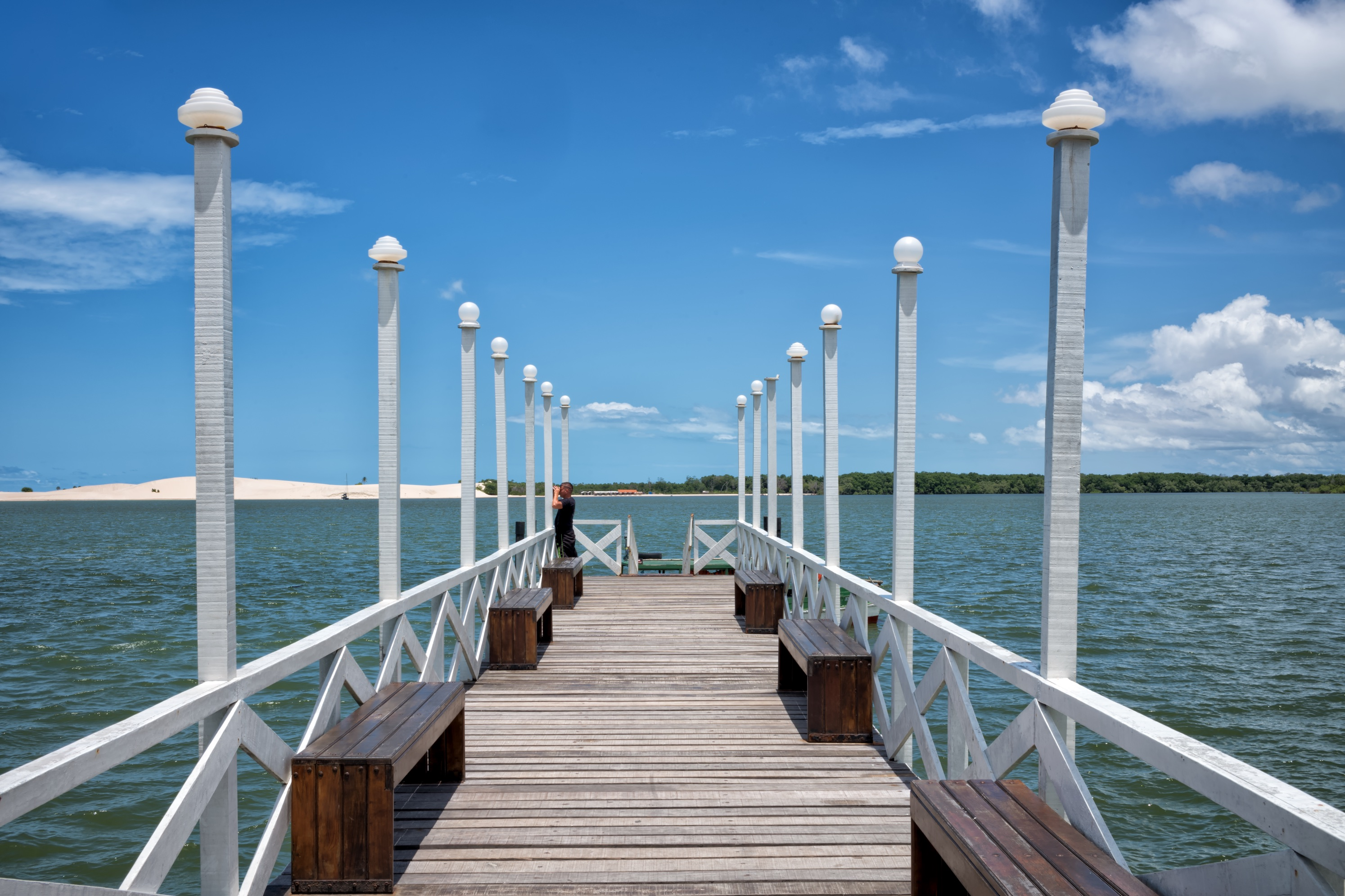 Camocim-4